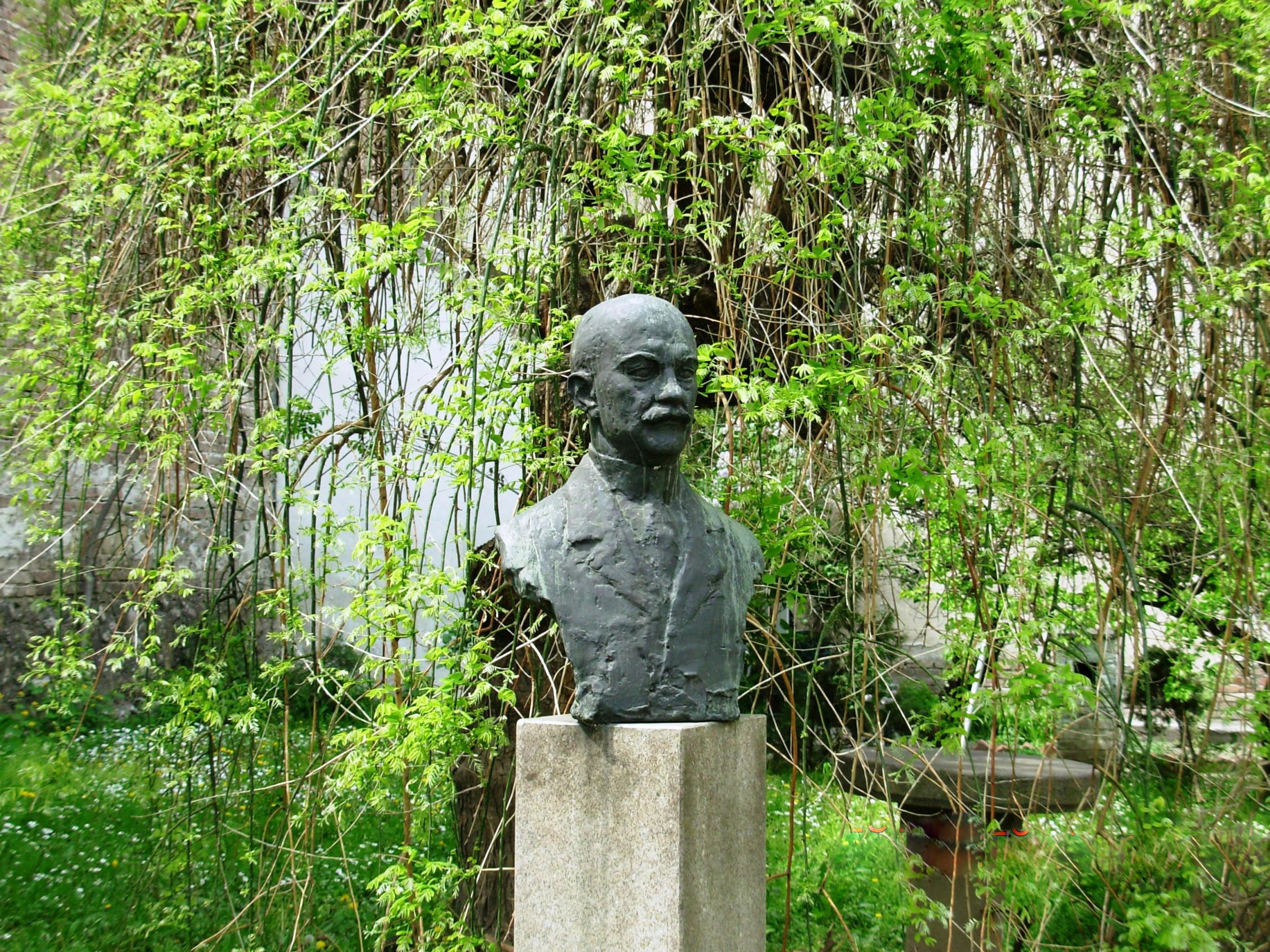 Kip Jovana Cvijića u dvorištu kuće u kojoj je živeo, Kopitareva gradina,Bbeograd. Snimio Goldfinger